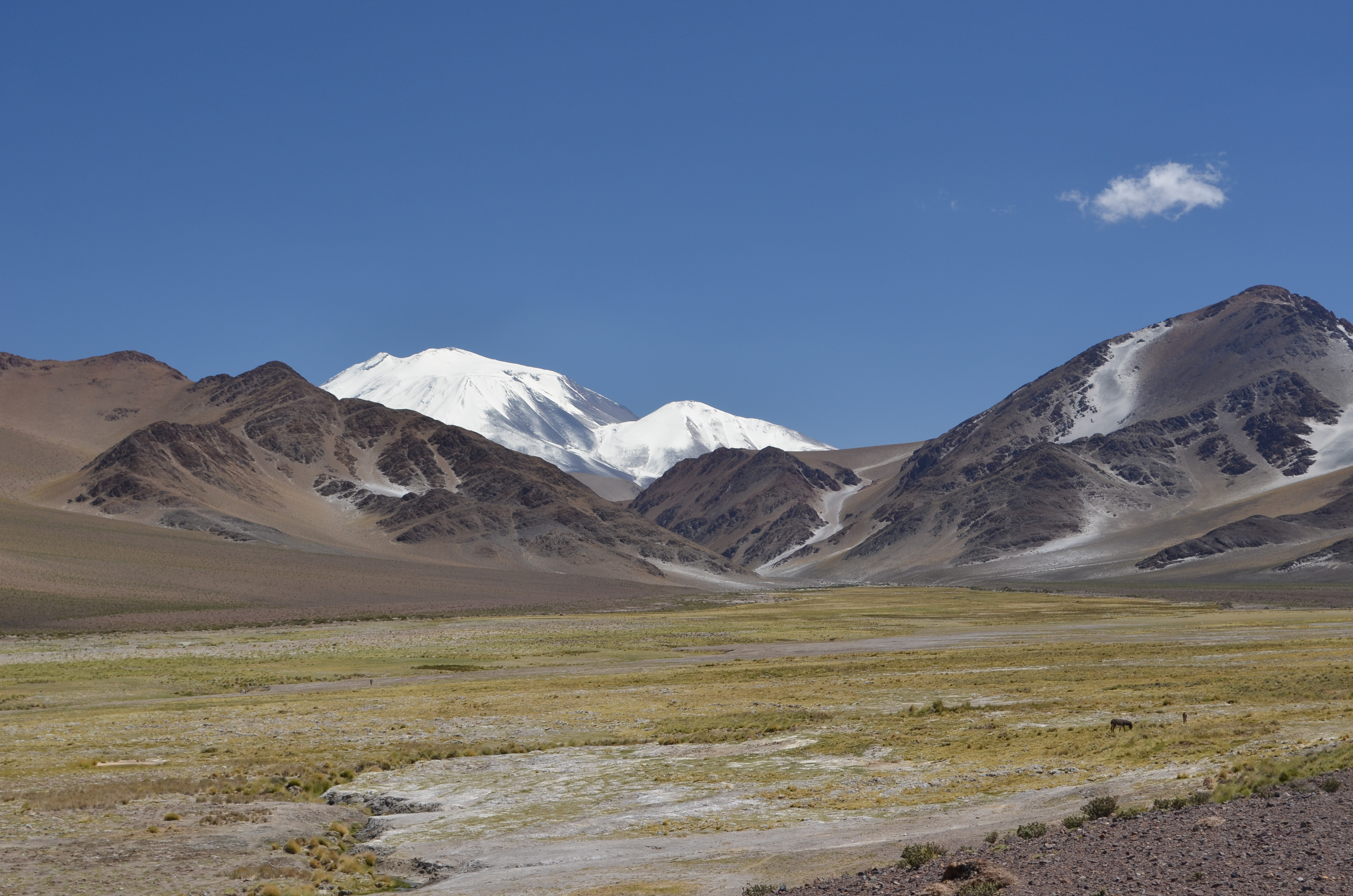 Volcan Incahuasi - 6.638 m.s.n.m.